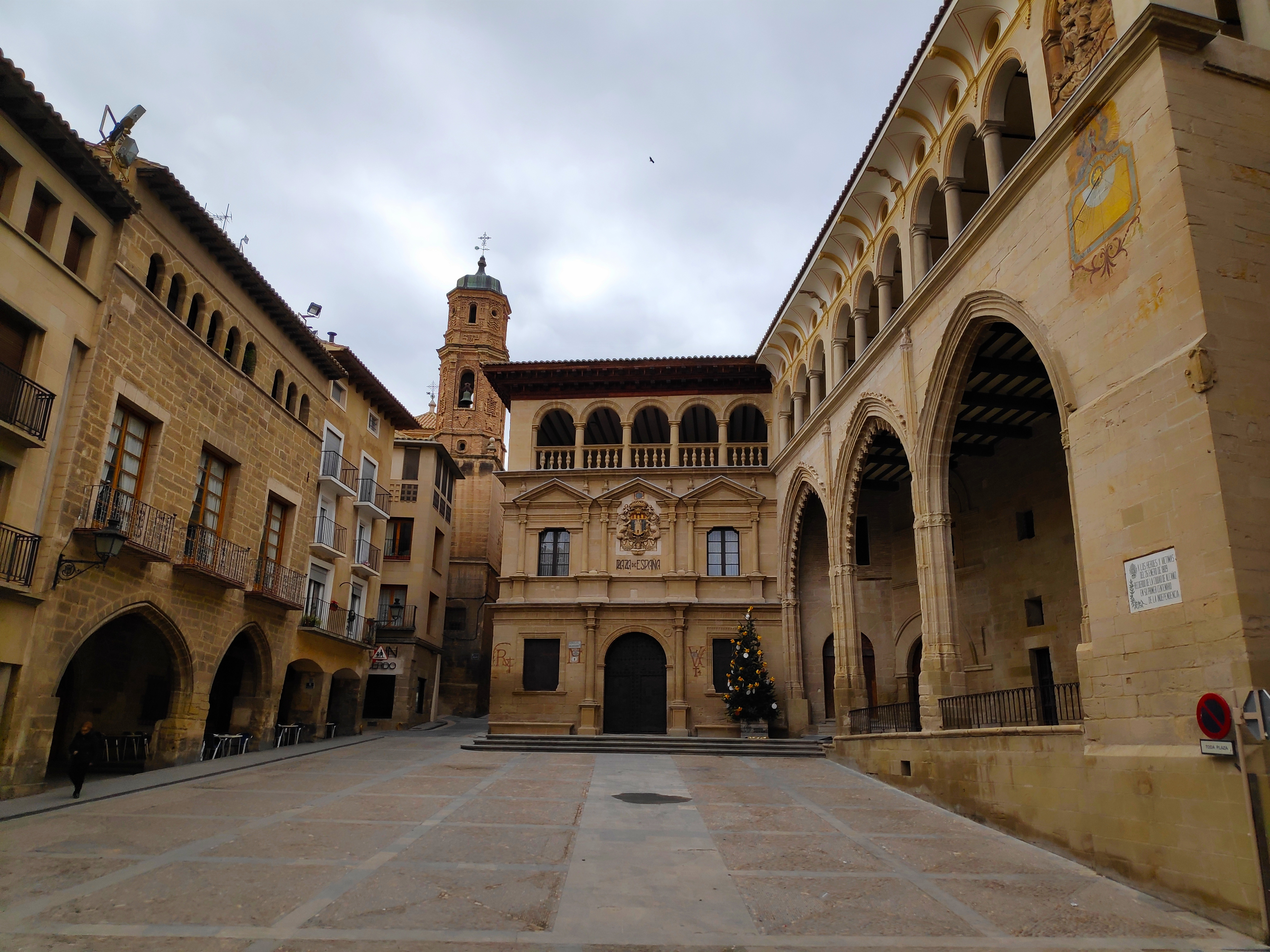 Plaza de España de Alcañiz después de la restauración del ayuntamiento y lonja en 2019 (foto tomada Diciembre 2019)